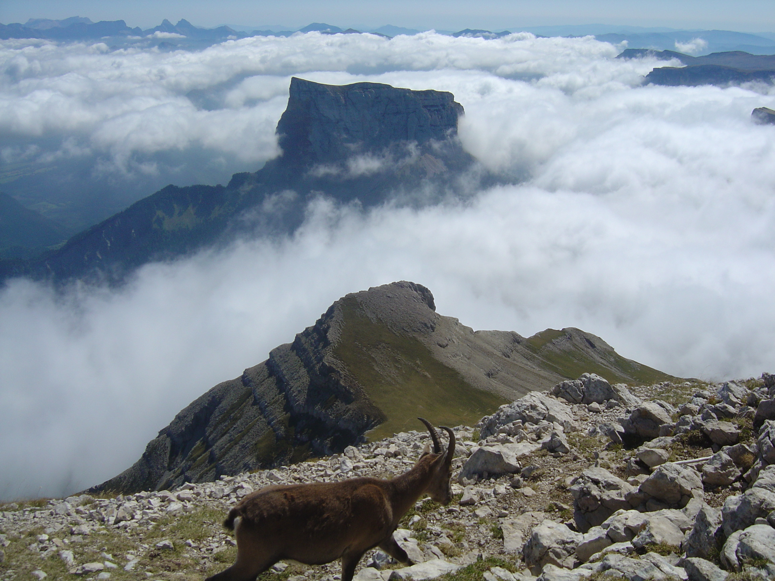 Bouquetin sur le sommet du Grand Veymont (2341m). Plus bas le mont Aiguille (2086m) au-dessus de la mer de nuages.